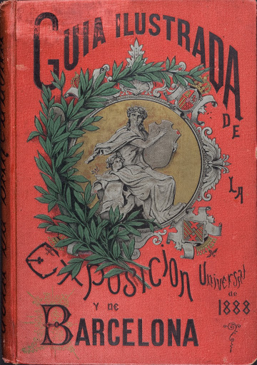 Portada de guía ilustrada